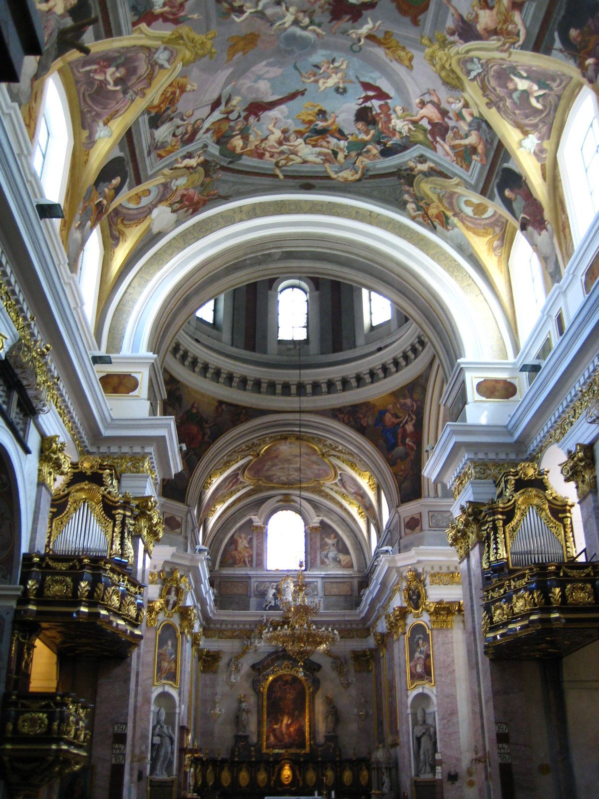 cerkvijo sv. Nikolaja